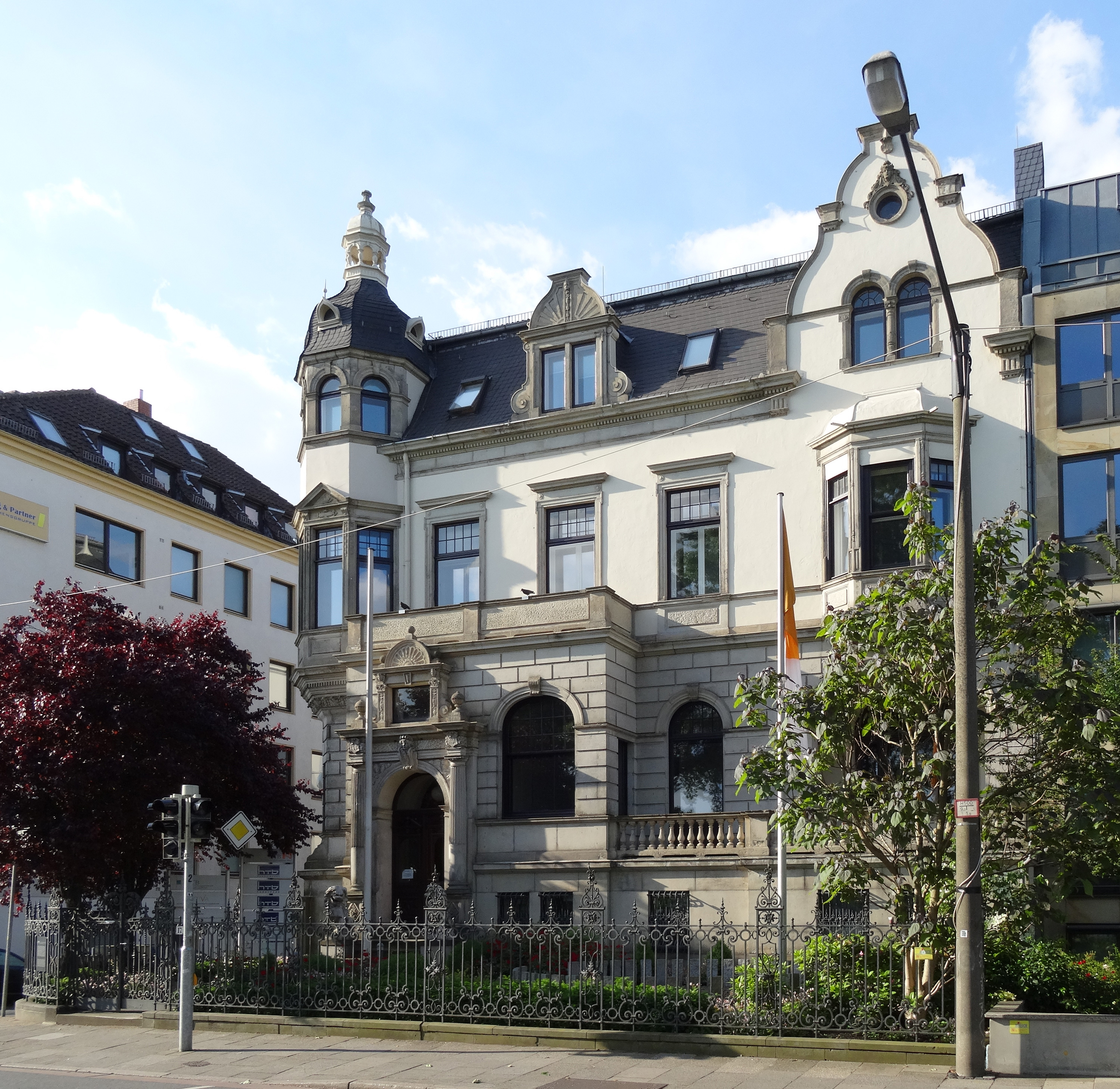 Haus Hirschfeld in Bremen, Osterdeich 17Das abgebildete Objekt ist ein geschütztes Kulturdenkmal in der Freien Hansestadt Bremen, mit der Nr. 0964 beim Landesamt für Denkmalpflege registriert.